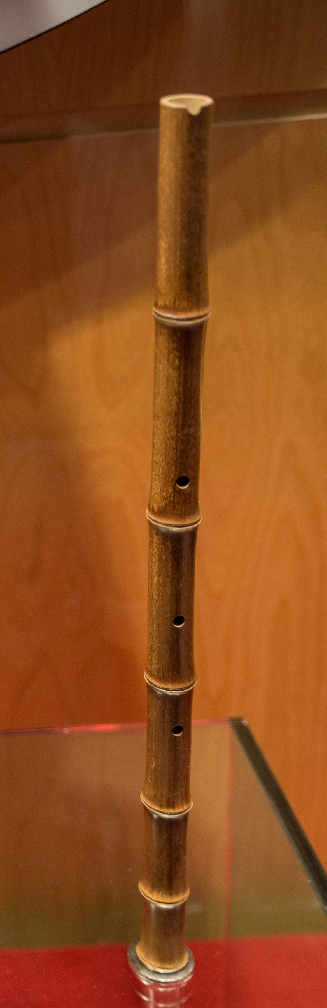 Jeok, exposat a Eolssigu! Els sons de Corea